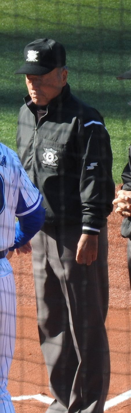 小林毅二審判員